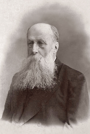 Vladimir Karlovic Vinberg